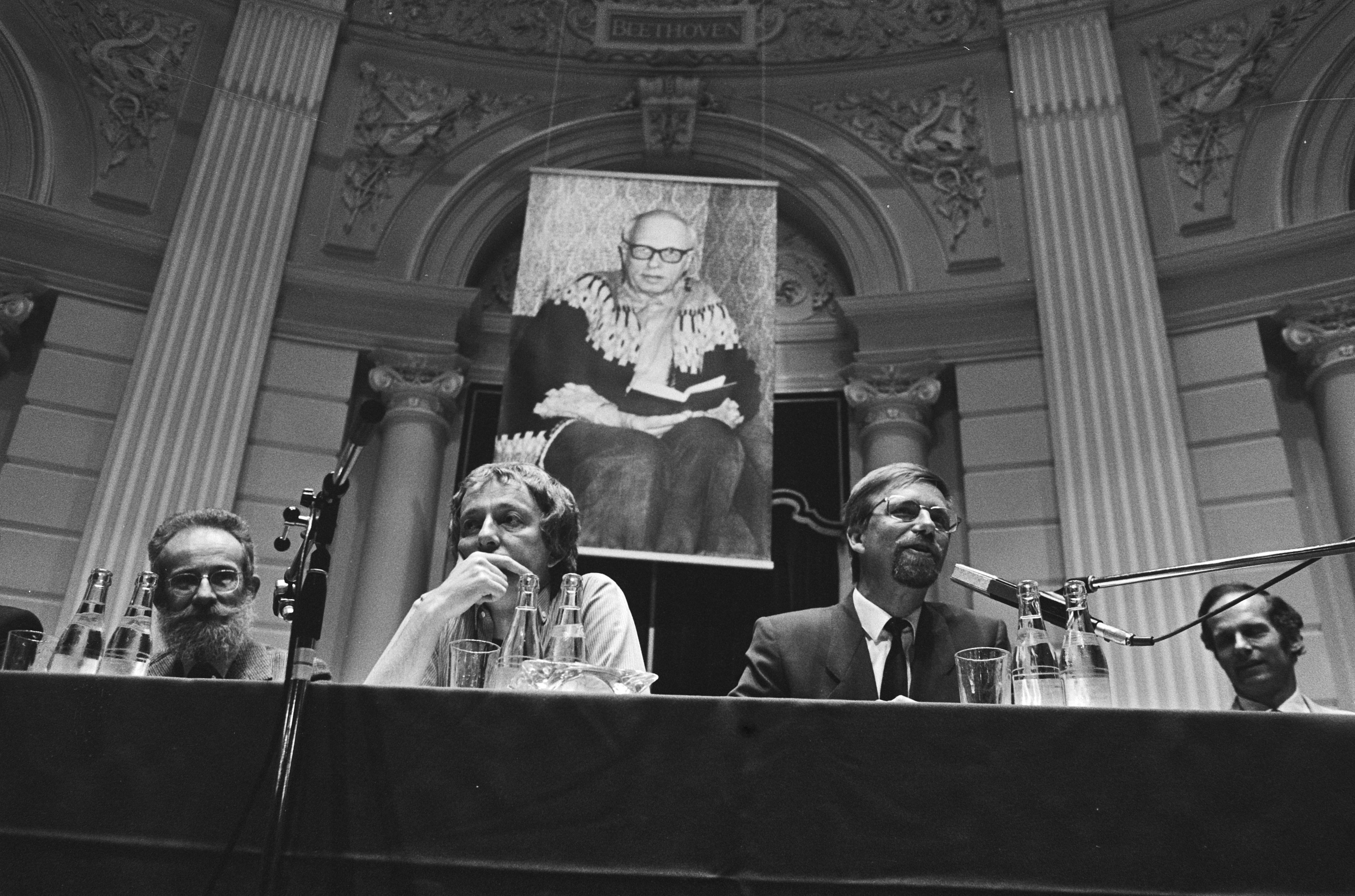 Sacharovweek-forum "40 jaar vrede en veiligheid" in Concertgebouw Amsterdam (NL) vlnr prof. F.J.M. Feldbrugge, Mient Jan Faber (IKV) en voorzitter Bart Tromp. 20 mei 1985